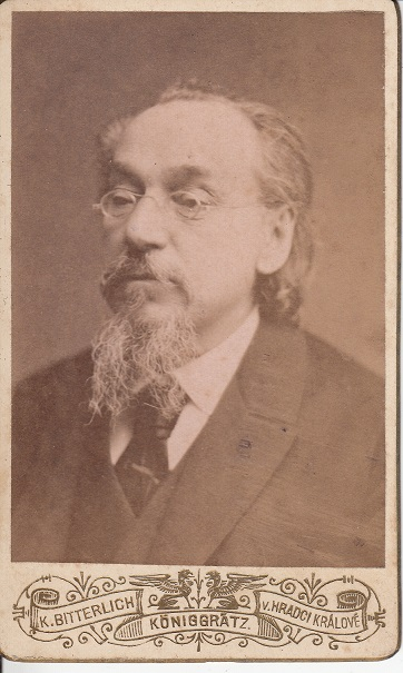 Portrét Kristiana Stefana, ateliér K. Bitterlich, Hradec Králové, nedatováno